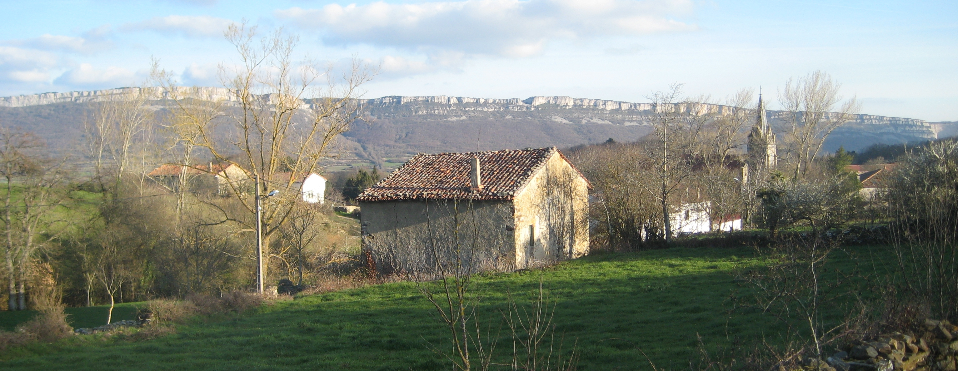 Noceco, Merindad de Montija, Burgos, España